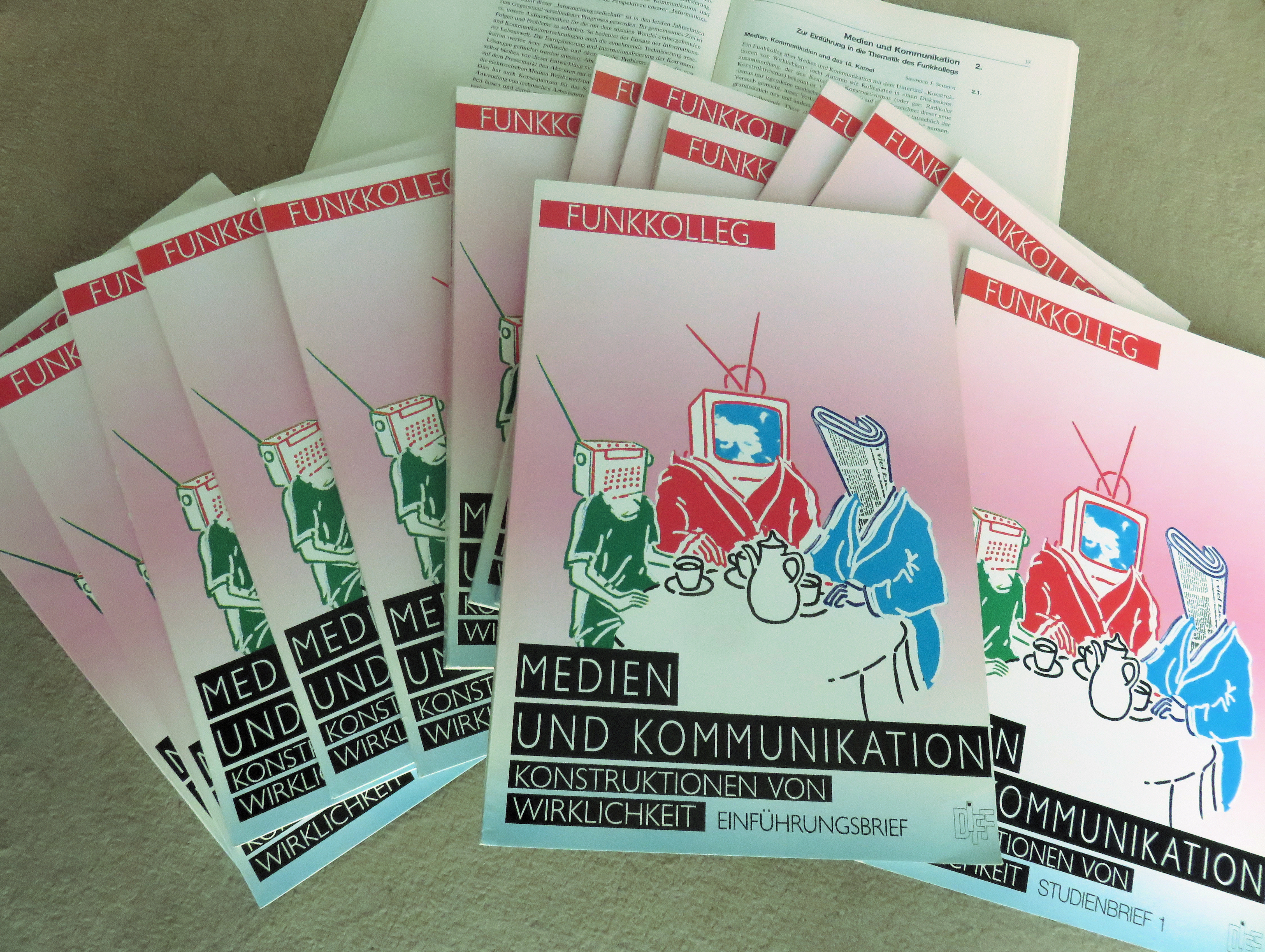 Studienbriefe des Funkkollegs Medien und Kommunikation